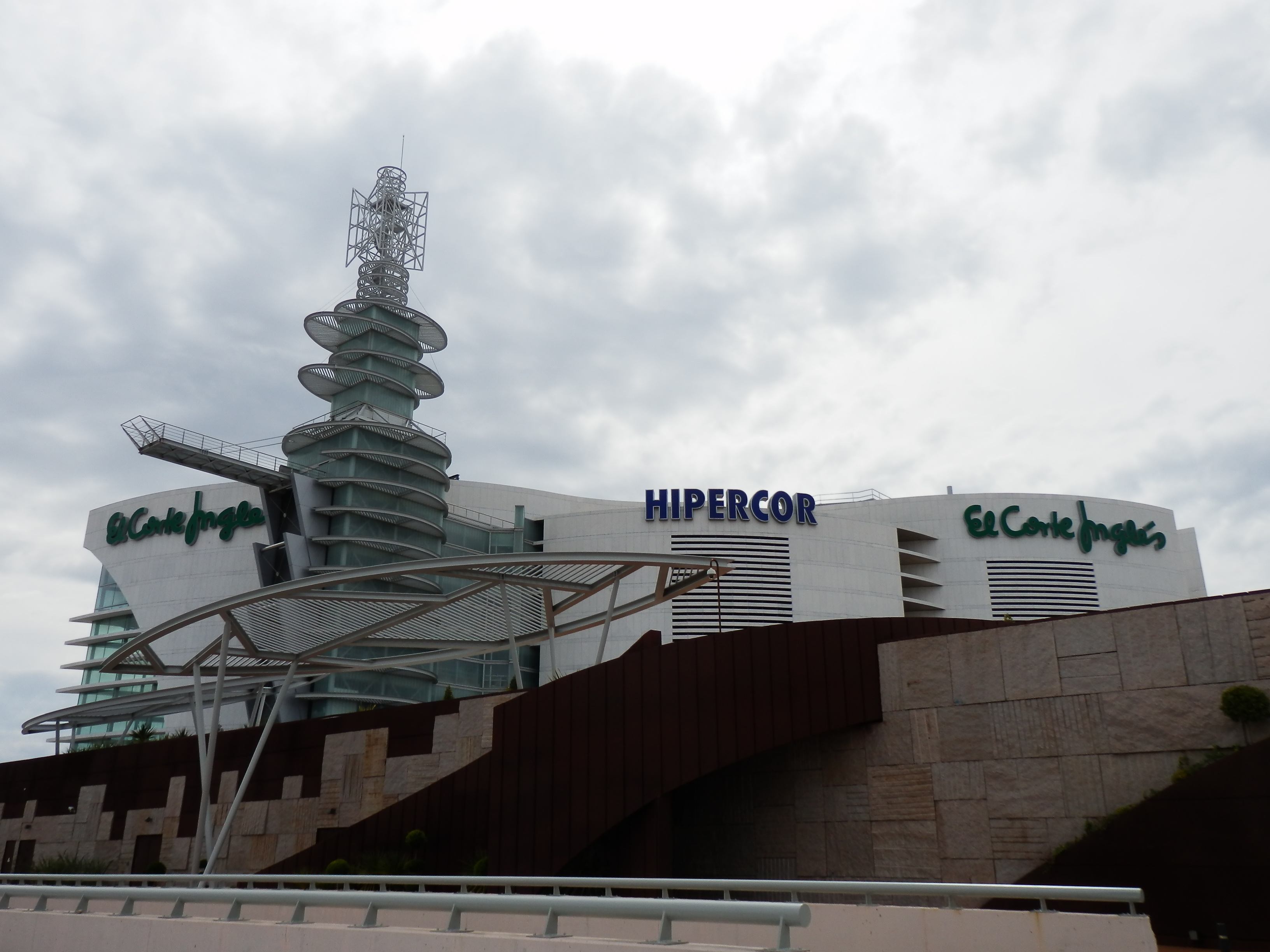 Centro comercial Hipercor en Puerto Venecia de Zaragoza.